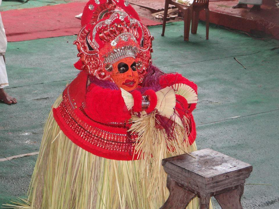 VishnuMoorthy_theyyam